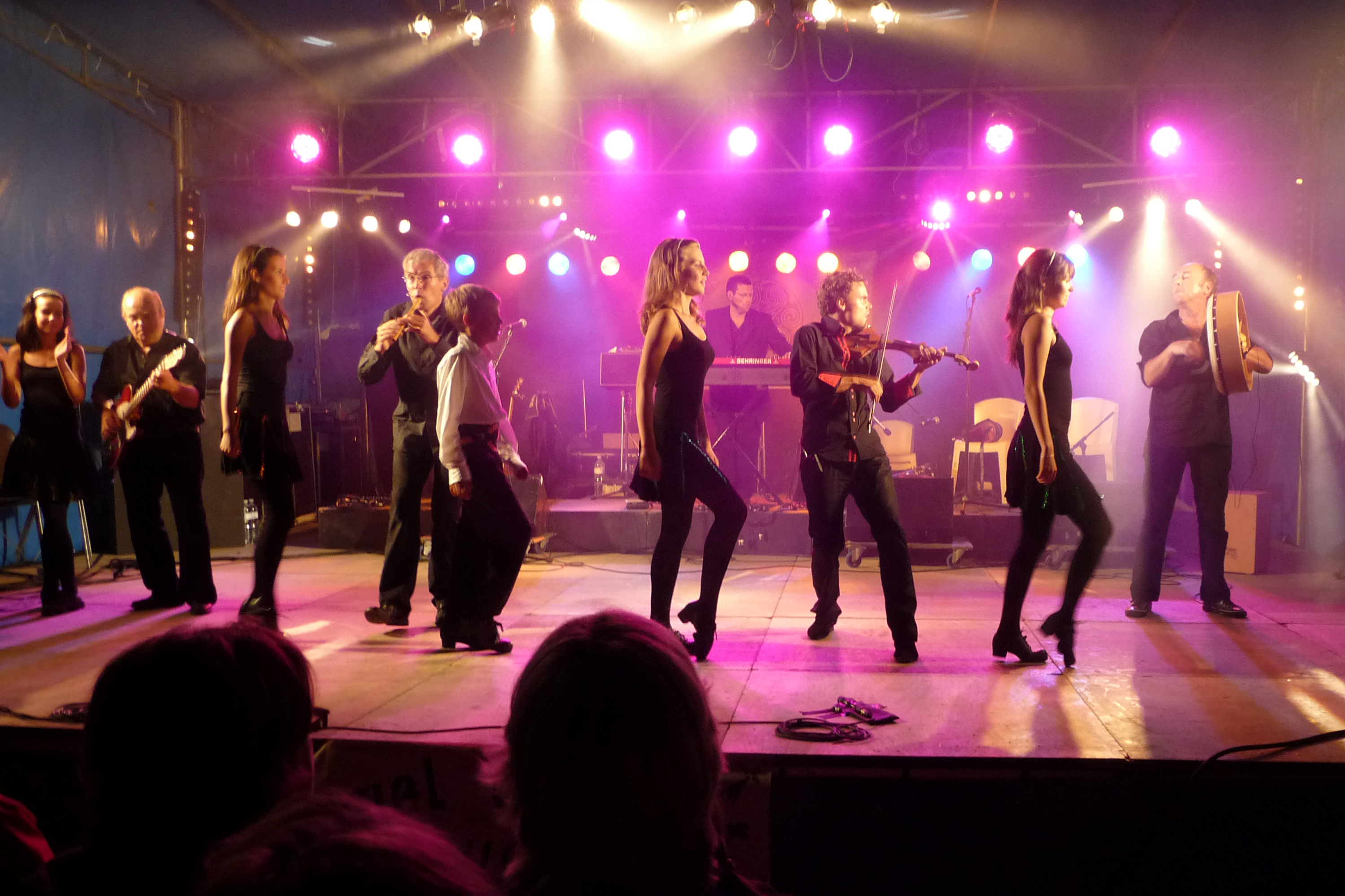 Festival Gouel An Eost de Plougoulm (2010)